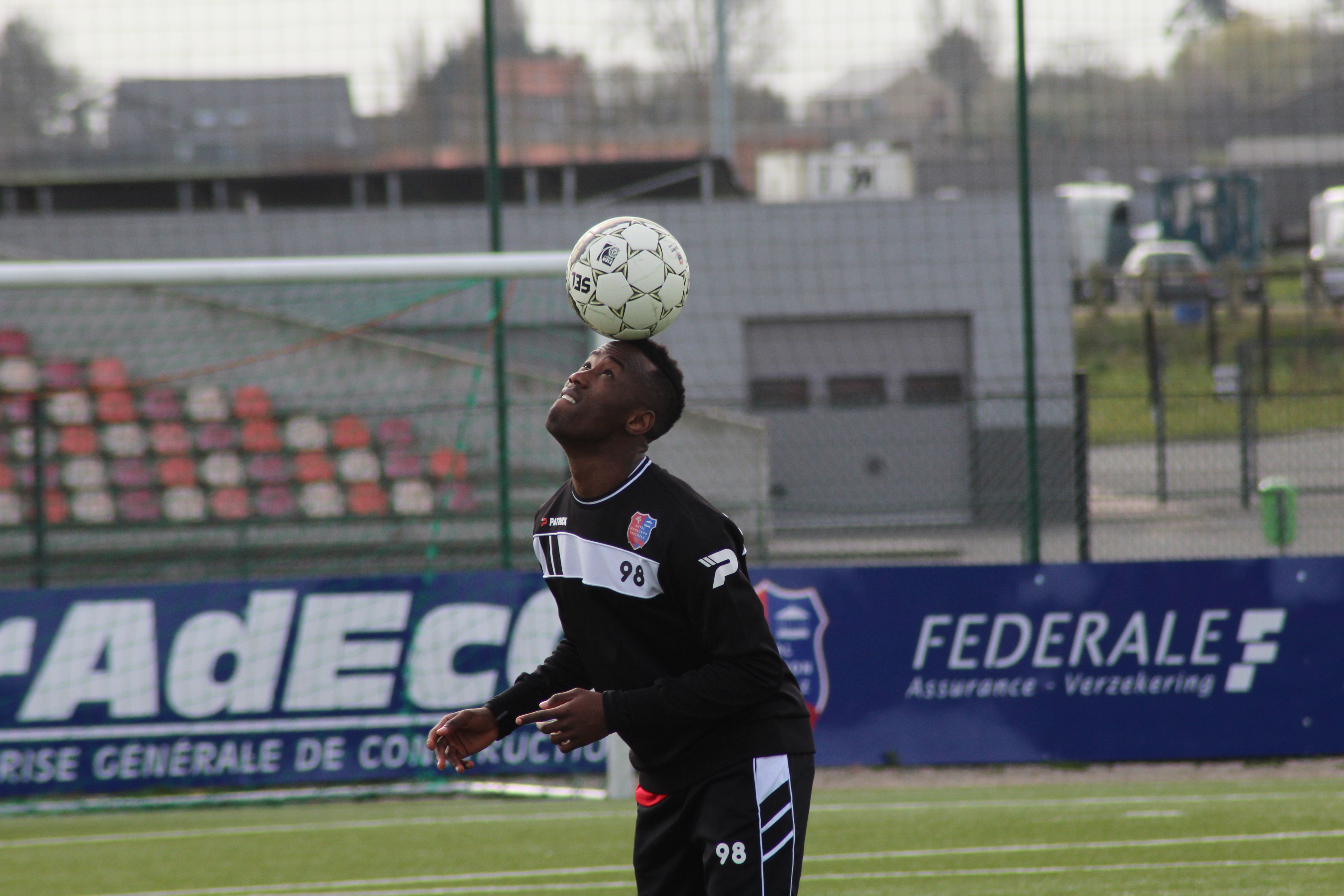 Training @ Royal Excel Mouscron